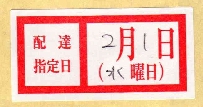 日本郵便の配達日指定シール＜(2017年)2月1日指定＞